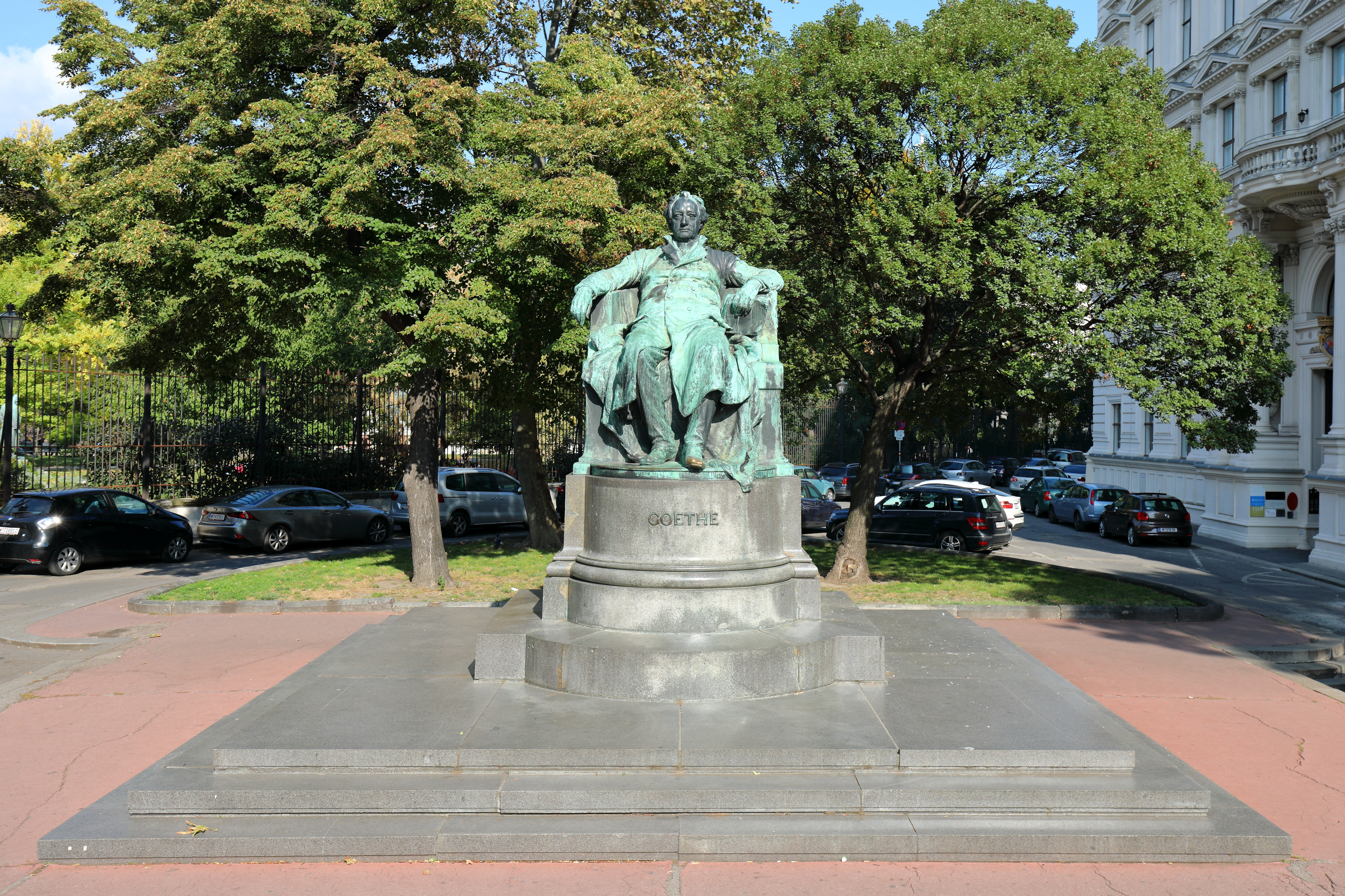 Das Goethedenkmal zwischen dem Palais Friedrich Schey von Koromla und dem Burggarten bzw. an der Ecke Opernring/Goethegasse im 1. Bezirk der österreichischen Bundeshauptstadt Wien. Das Denkmal zu Ehren Johann Wolfgang von Goethe wurde von Edmund von Hellmer entworfen und am 15. Dezember 1900 enthüllt.